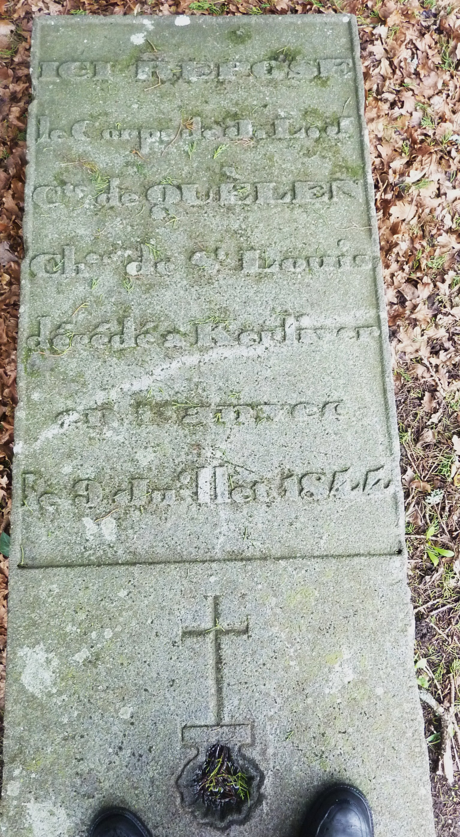 Hanvec (près de la chapelle de Lanvoy) : la tombe de Jacques Louis Joseph, comte de Quelen, maire de Hanvec entre 1815 et 1830 et émigré sous la Révolution